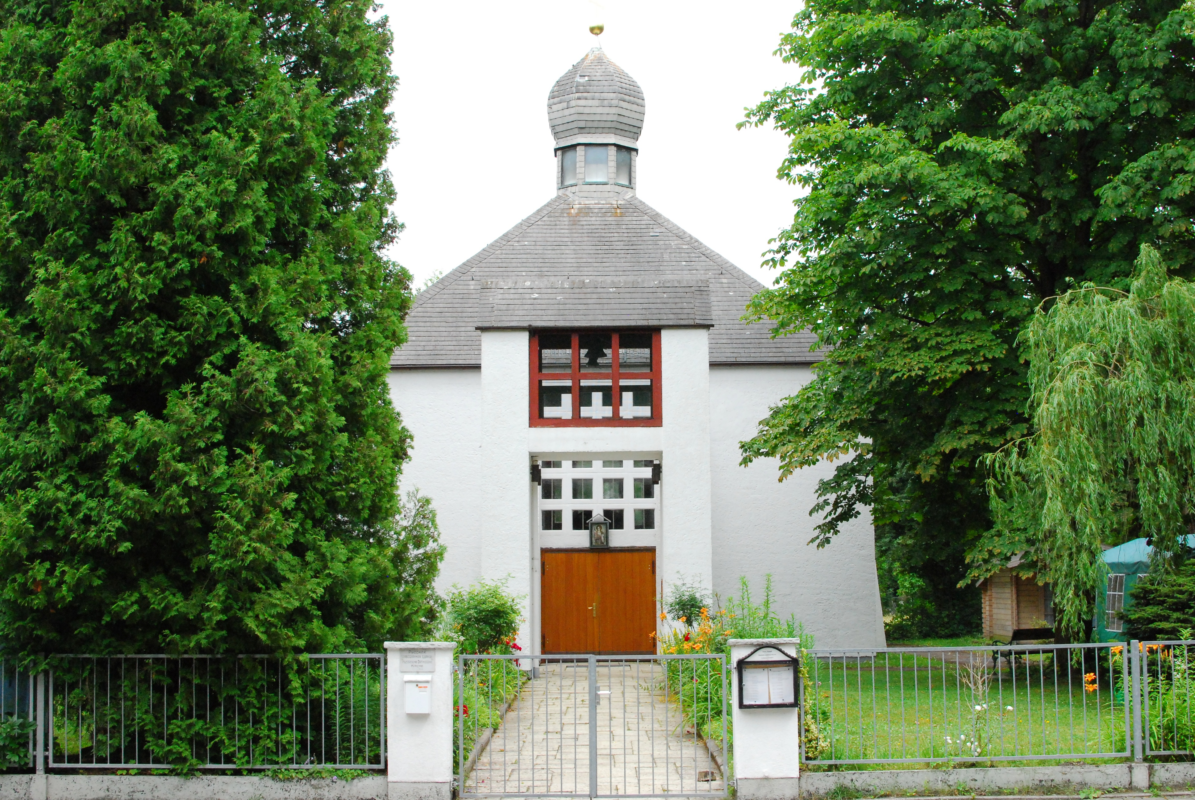 Russische Orthodoxe Kirche St. Michael in Ludwigsfeld, München, Oberbayern, Bayern.